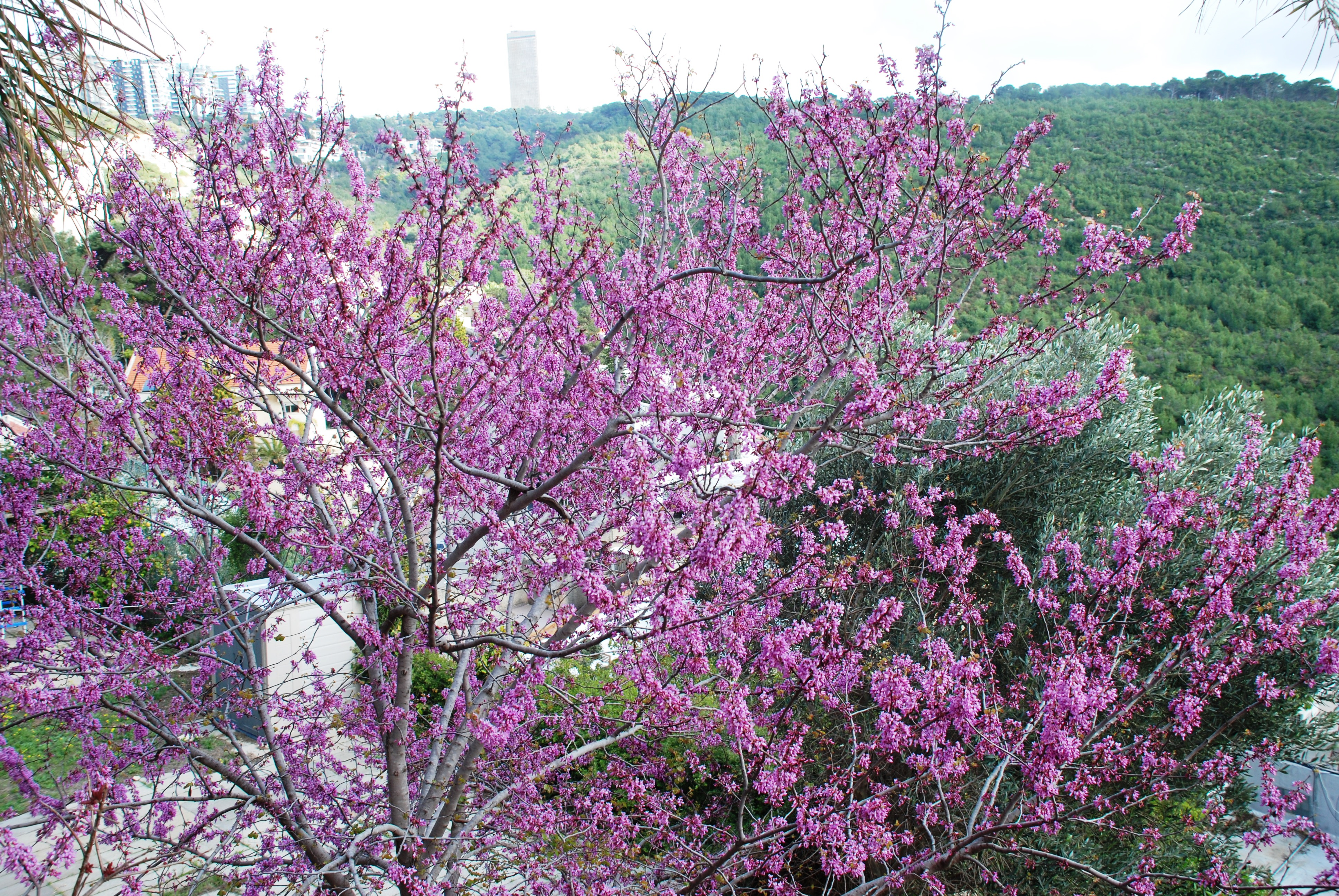 כליל החורש מצולם בשכונת דניה